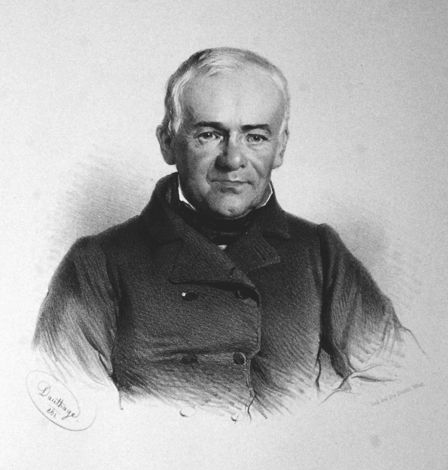 Karl Wiser - Bürgermeister von Linz 1873-1885, Lithographie von Adolf Dauthage